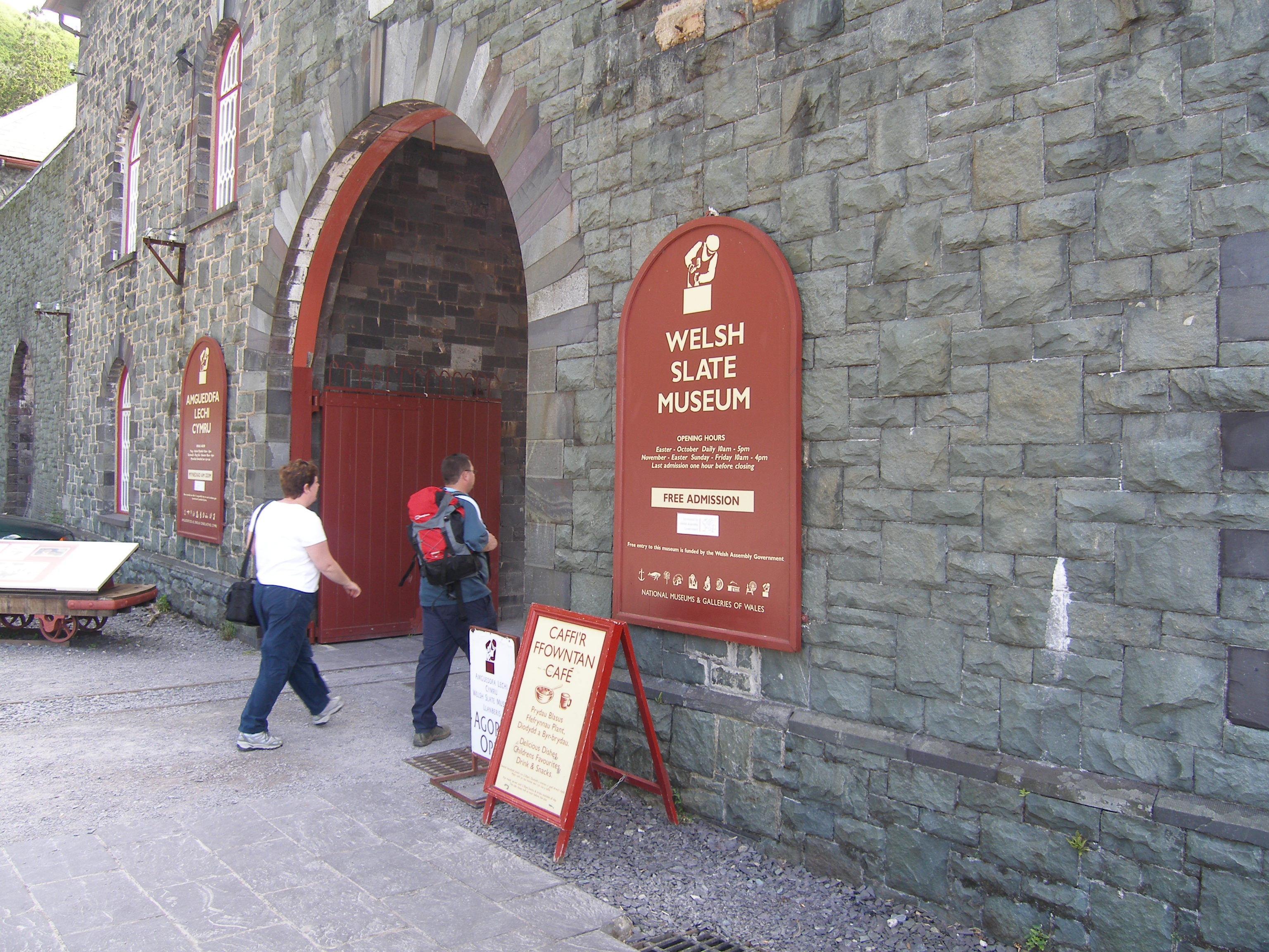 Welsh Slate Museum, 14-06-2006, japiot